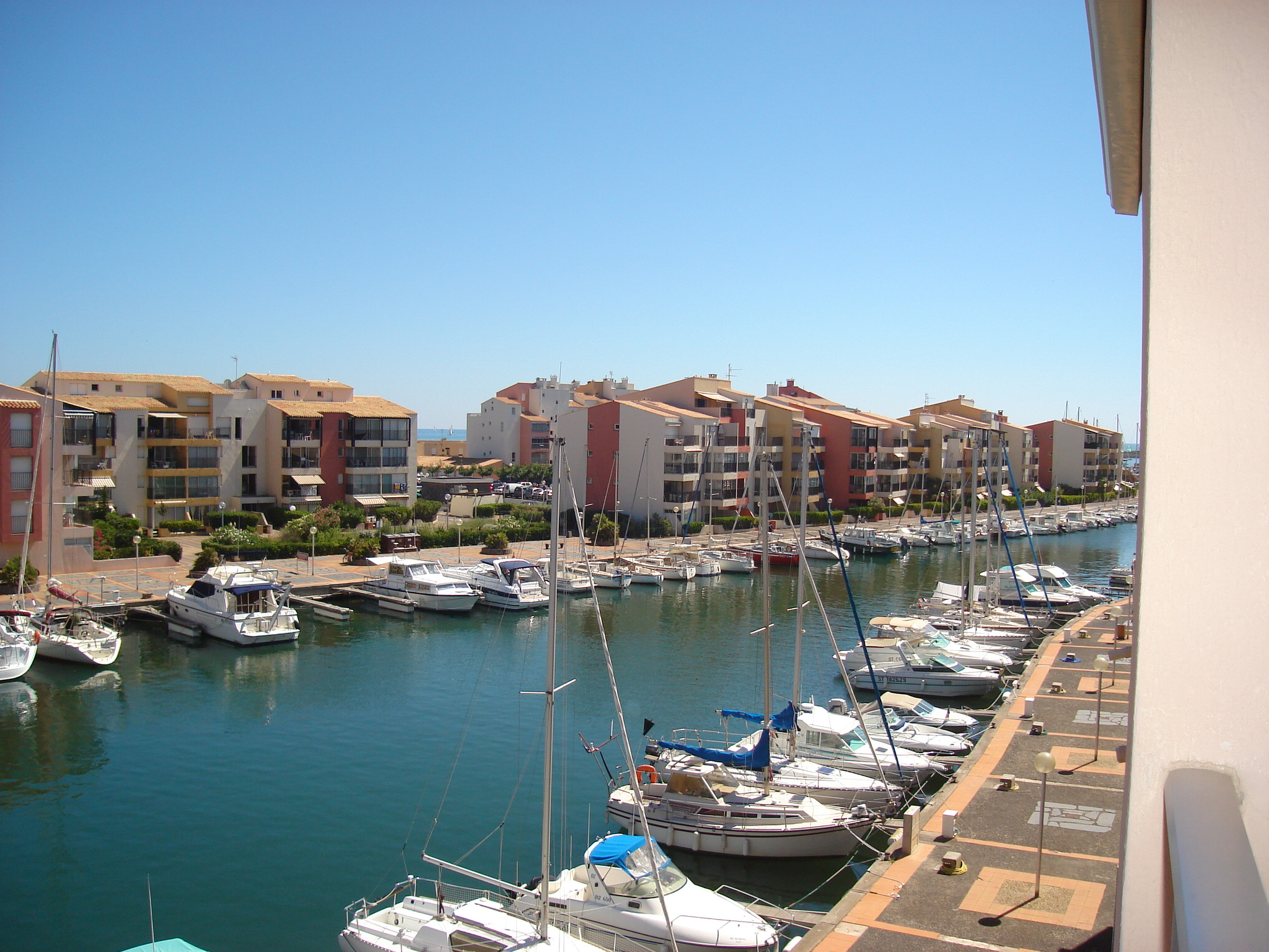 Cap d'Agde (Hérault, France) - l'Avant-port et l'île des Pêcheurs.